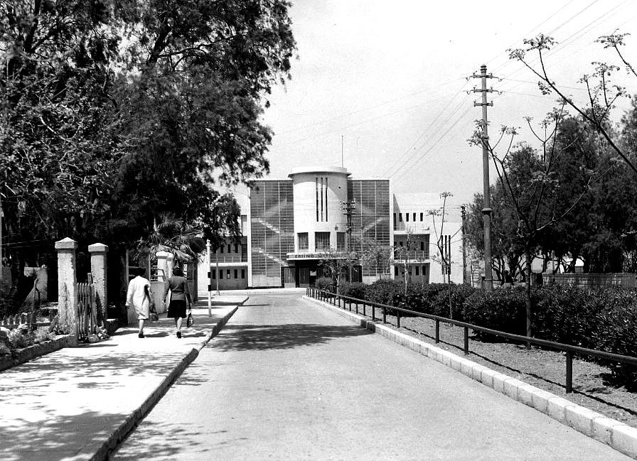 The Casino (dance club and restaurant) located in Bat Galim neighborhood of Haifa. Date Created/Published: [between 1940 and 1946] קזינו בת גלים בחיפה היה מועדון ריקודים ומסעדה. תוארך על ידי הצלם בין השנים 1940-1946